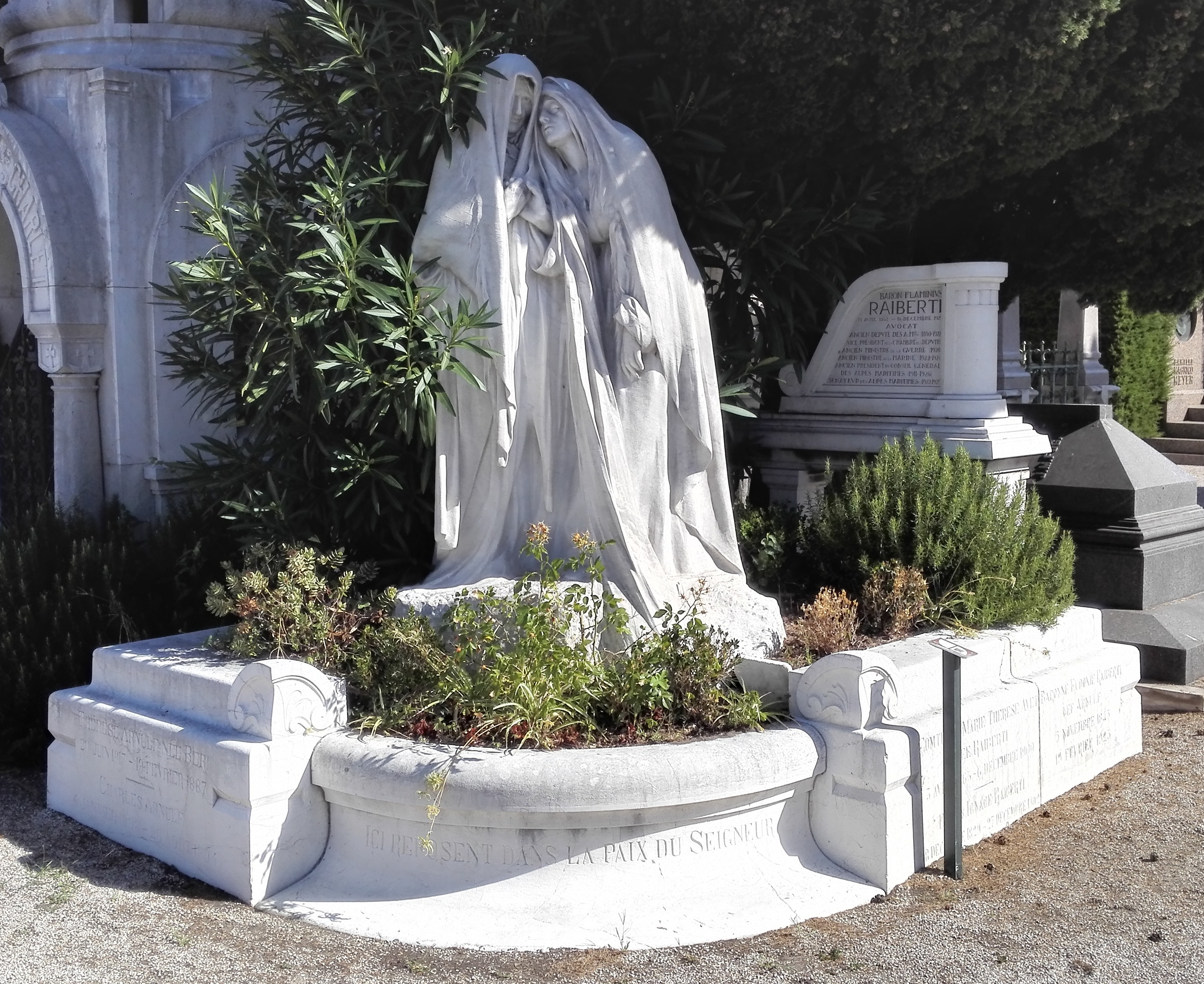 Couple, marbre signé non daté, de Théodore Rivière sur la sépulture de Flaminius Raiberti, homme politique, Cimetière du Château, Nice